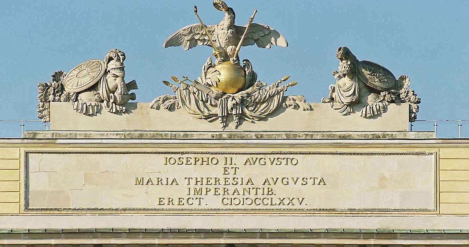 Inschrift auf der Gloriette in Wien